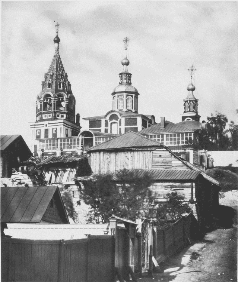 Храм Никиты Мученика на Швивой Горке